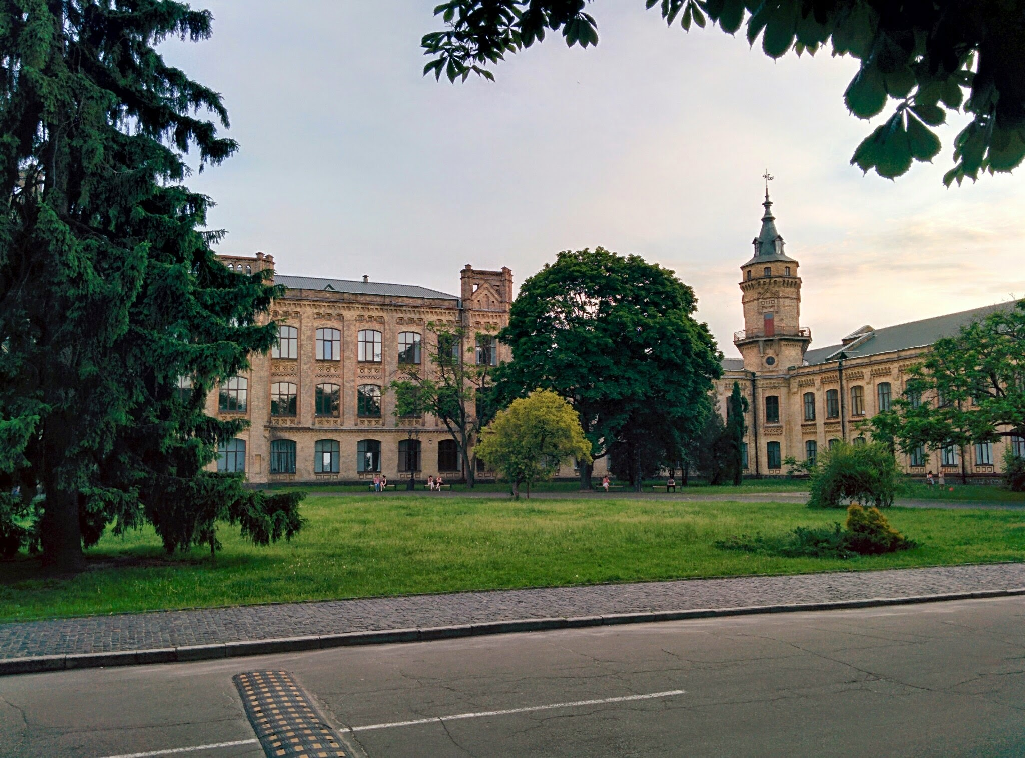 Парк КПІ, Солом'янський район, пр. Перемоги